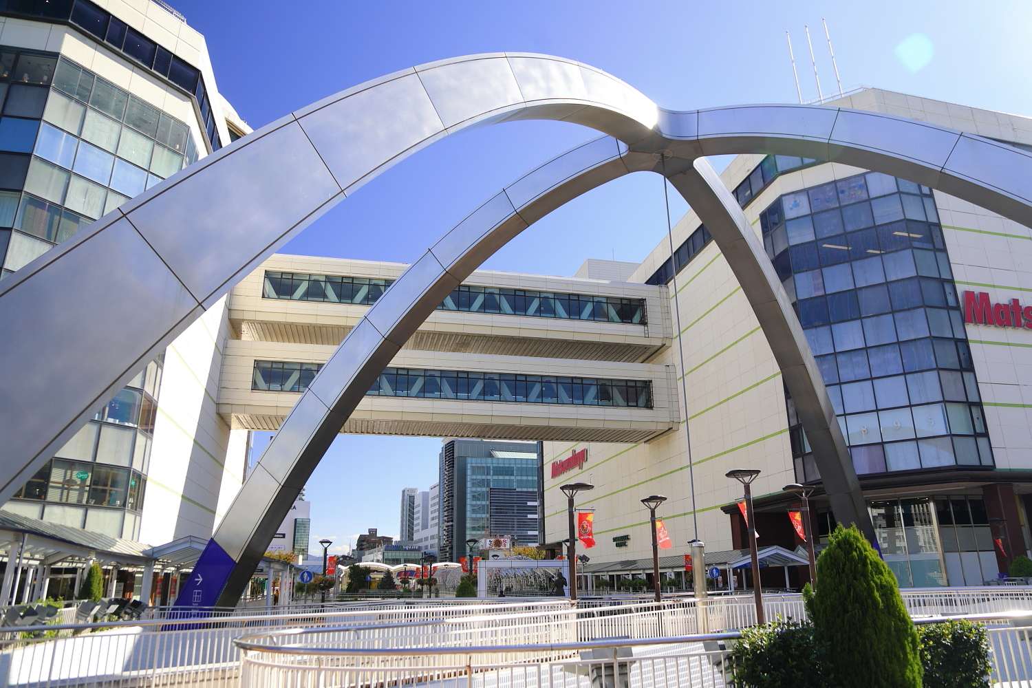 豊田市駅西口ペデストリアンデッキ（豊田市若宮町、2018年（平成30年）11月）